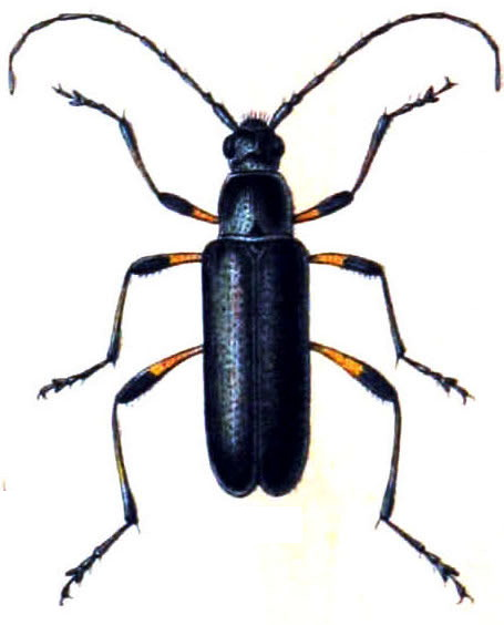 Grammoptera variegata Germ. = Grammoptera abdominalis (Stephens, 1831): adult, dorsal view